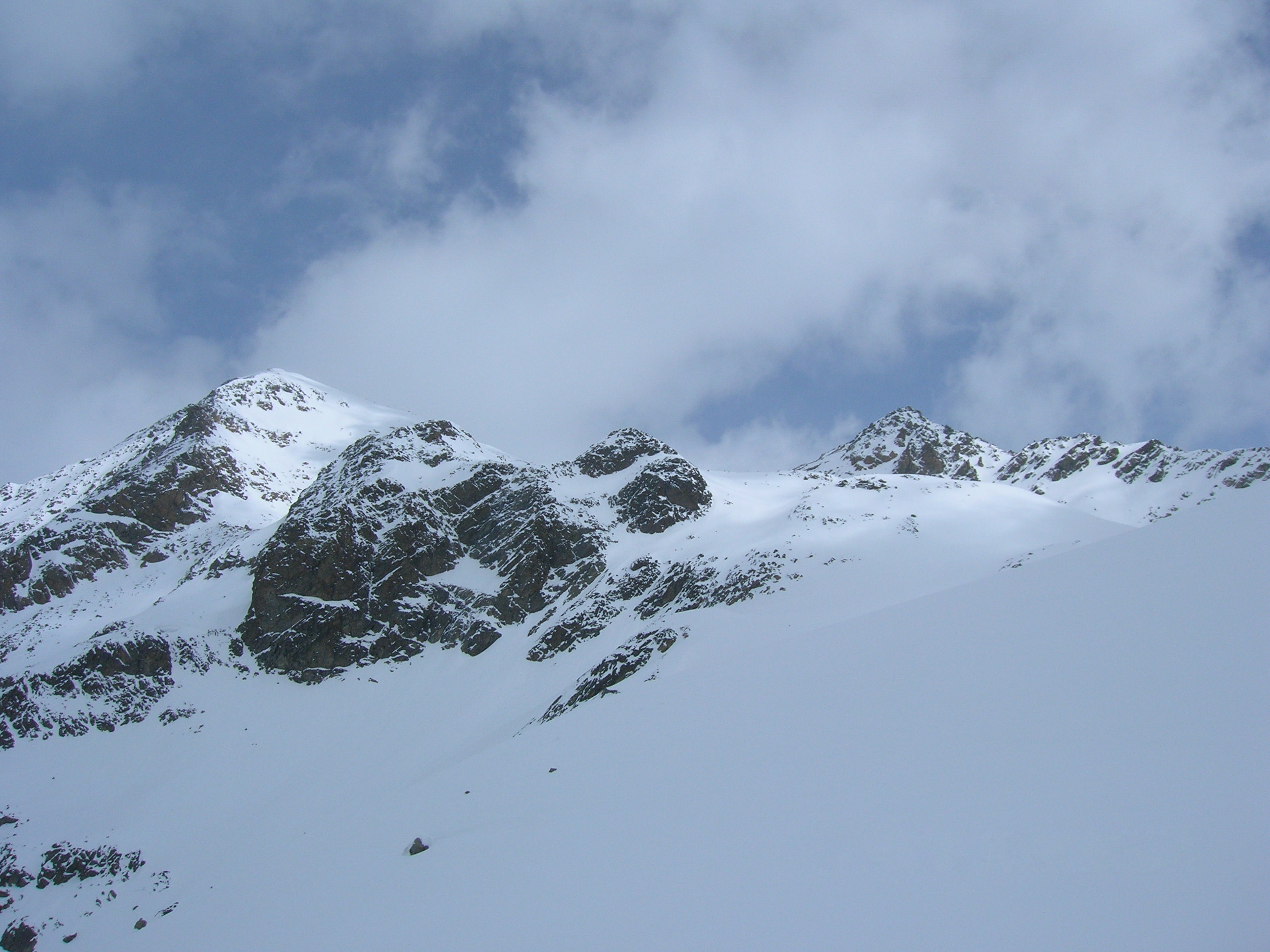 Pizzo di Dosdè da sud-ovest (alta Valtellina)